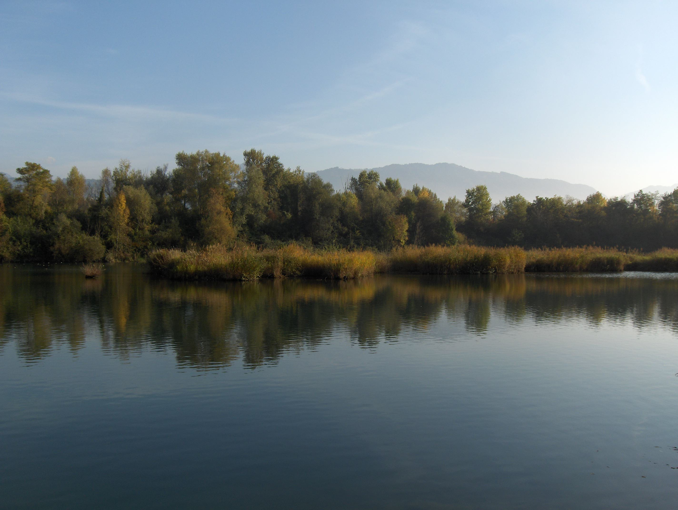 A l'intérieur des terres, 200 mètres environ en amont du delta de la Dranse, la réserve naturelle du delta de la Dranse. Des îlots servent d'abris aux espèces endémiques.